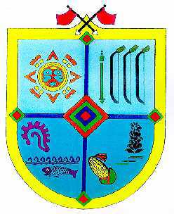 Stemma Bahia de Banderas